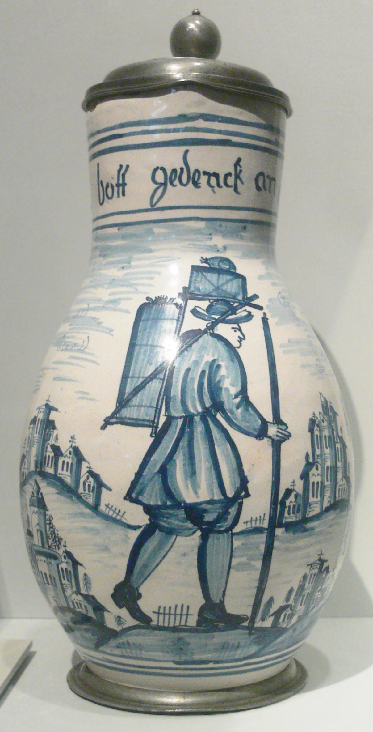 Kanne (Motiv: Hausierer/Bote), Fayence und Zinn, Württemberg um 1747 Landesmuseum Württemberg (Außenstelle Museum für Volkskultur in Württemberg, Waldenbuch) E.8.3, Inv. Nr. 1936/40